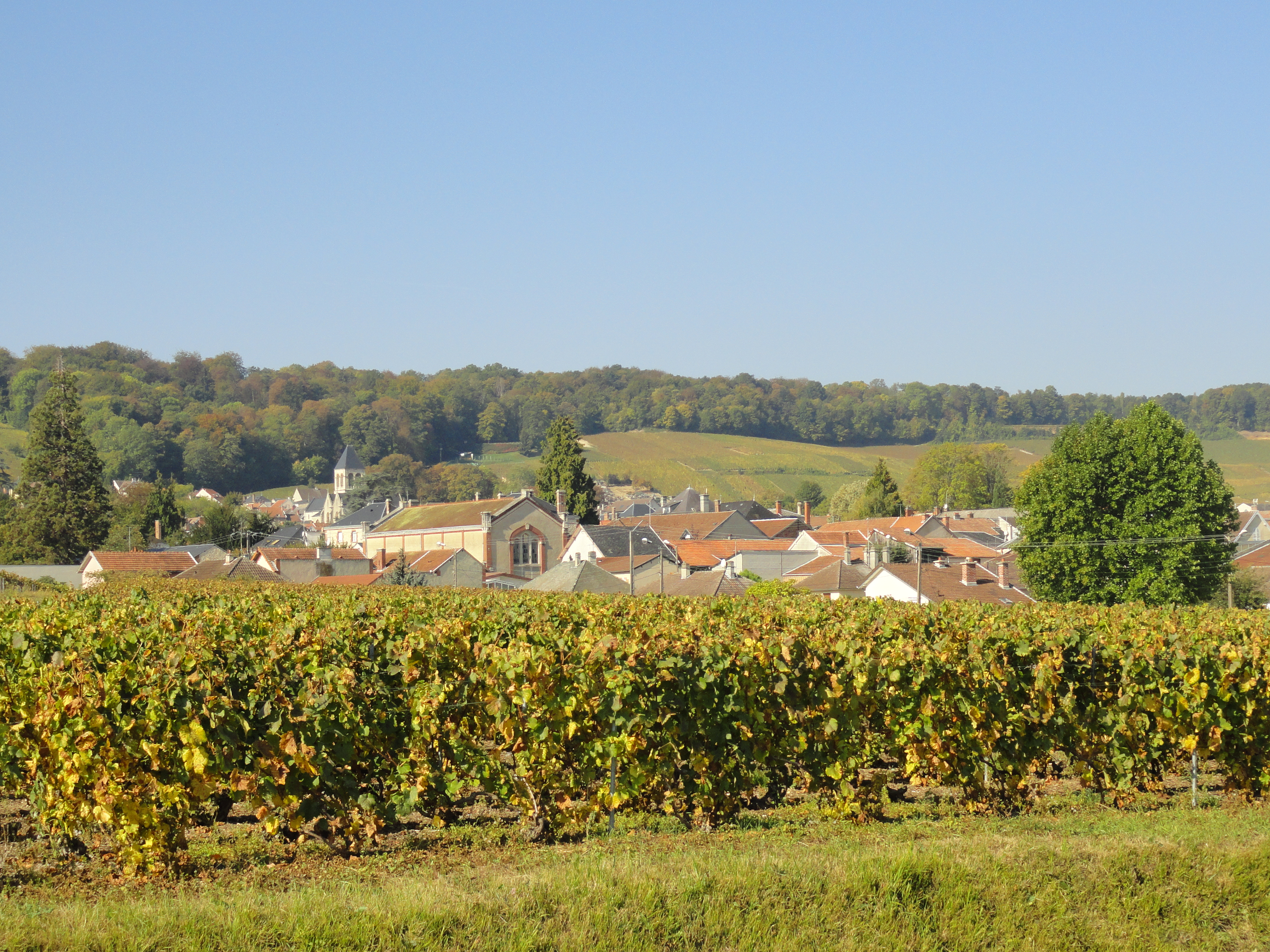 Vue du centre ancien d'Avize depuis un chemin de vigne entre Oger et Avize